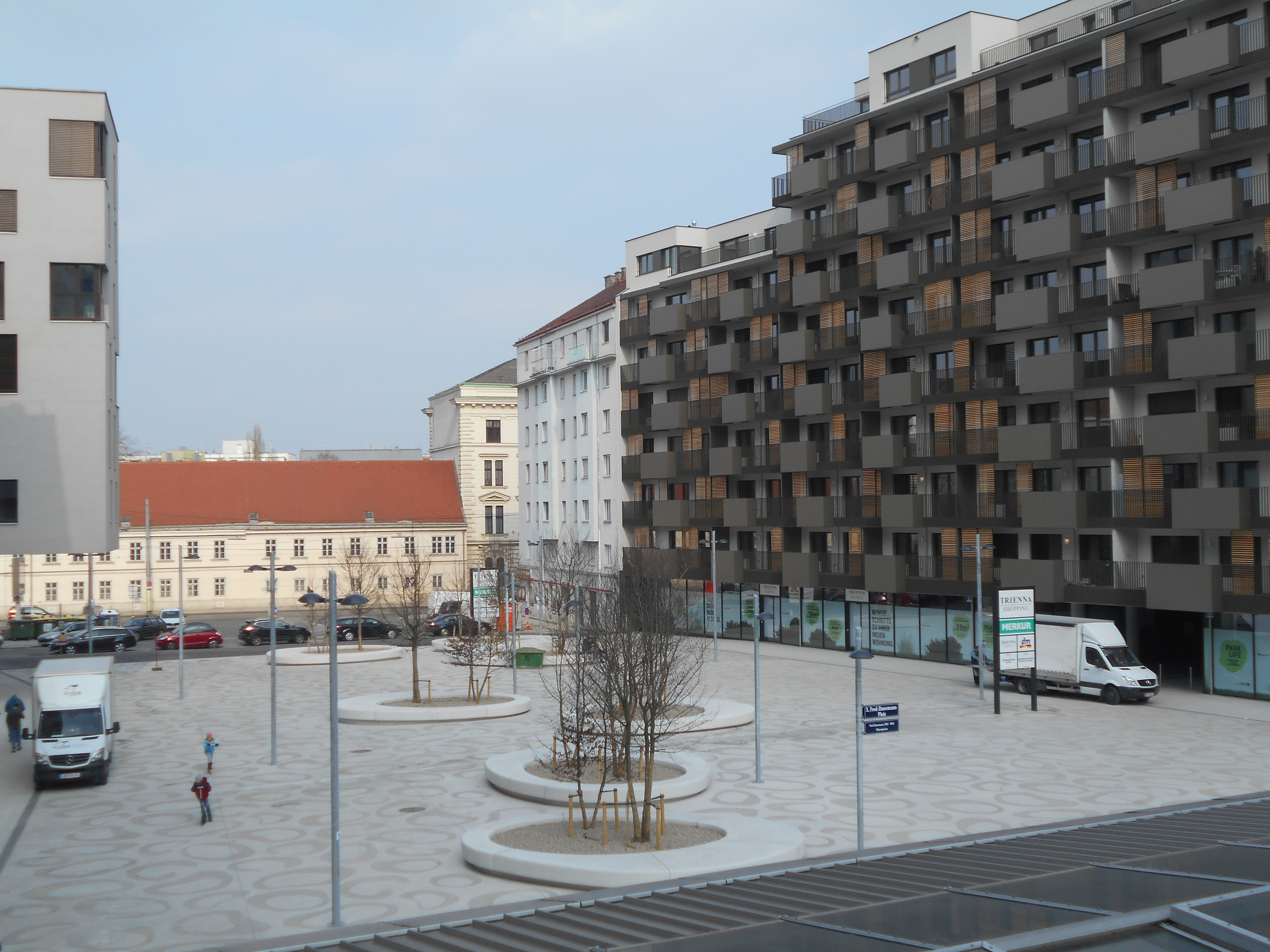 Der Fred-Zinnemann-Platz in den Aspanggründen